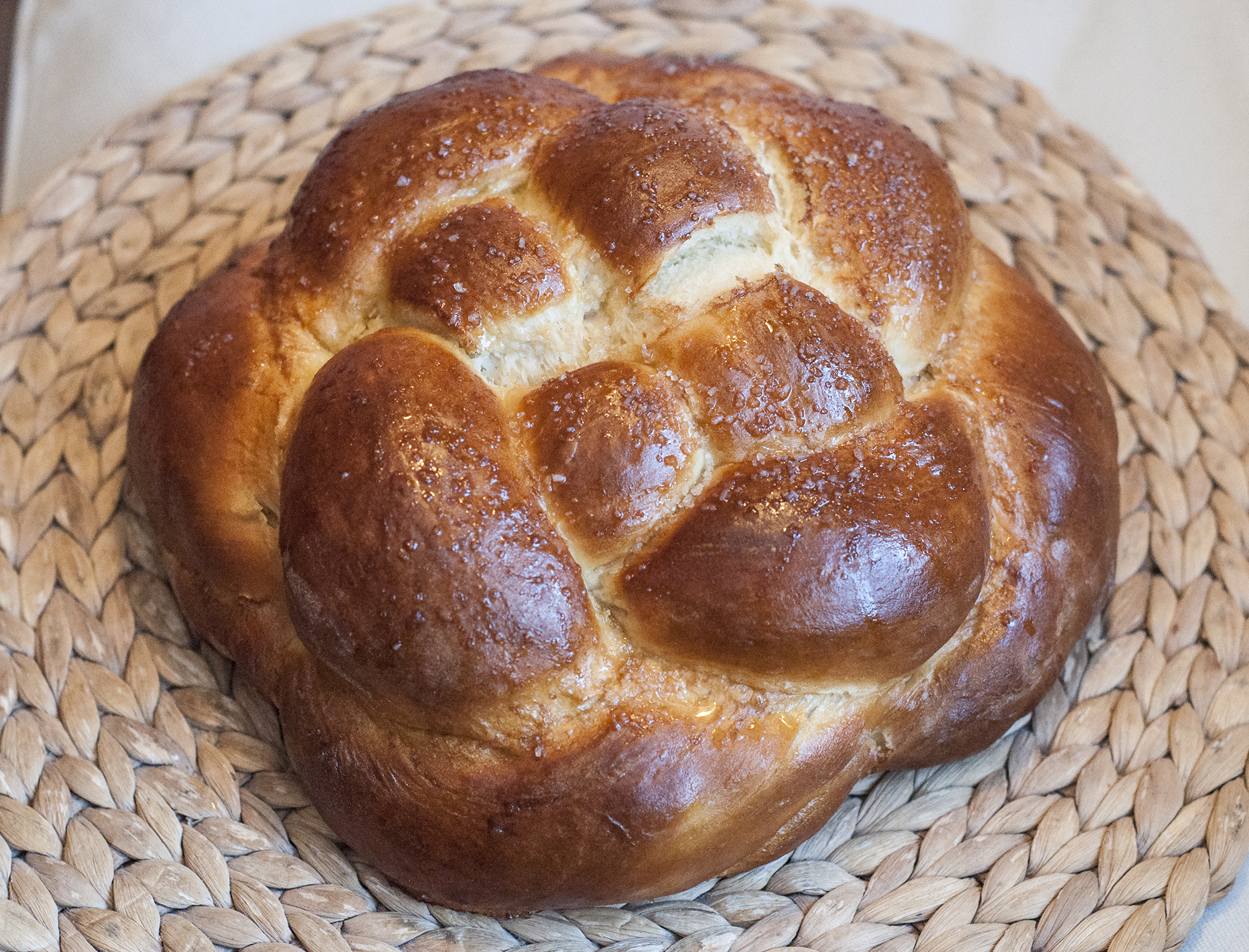 okrągła chałka